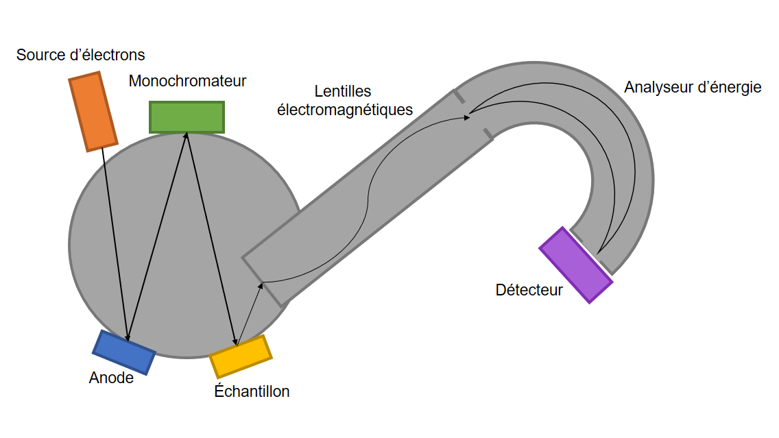 Instrumentation XPS